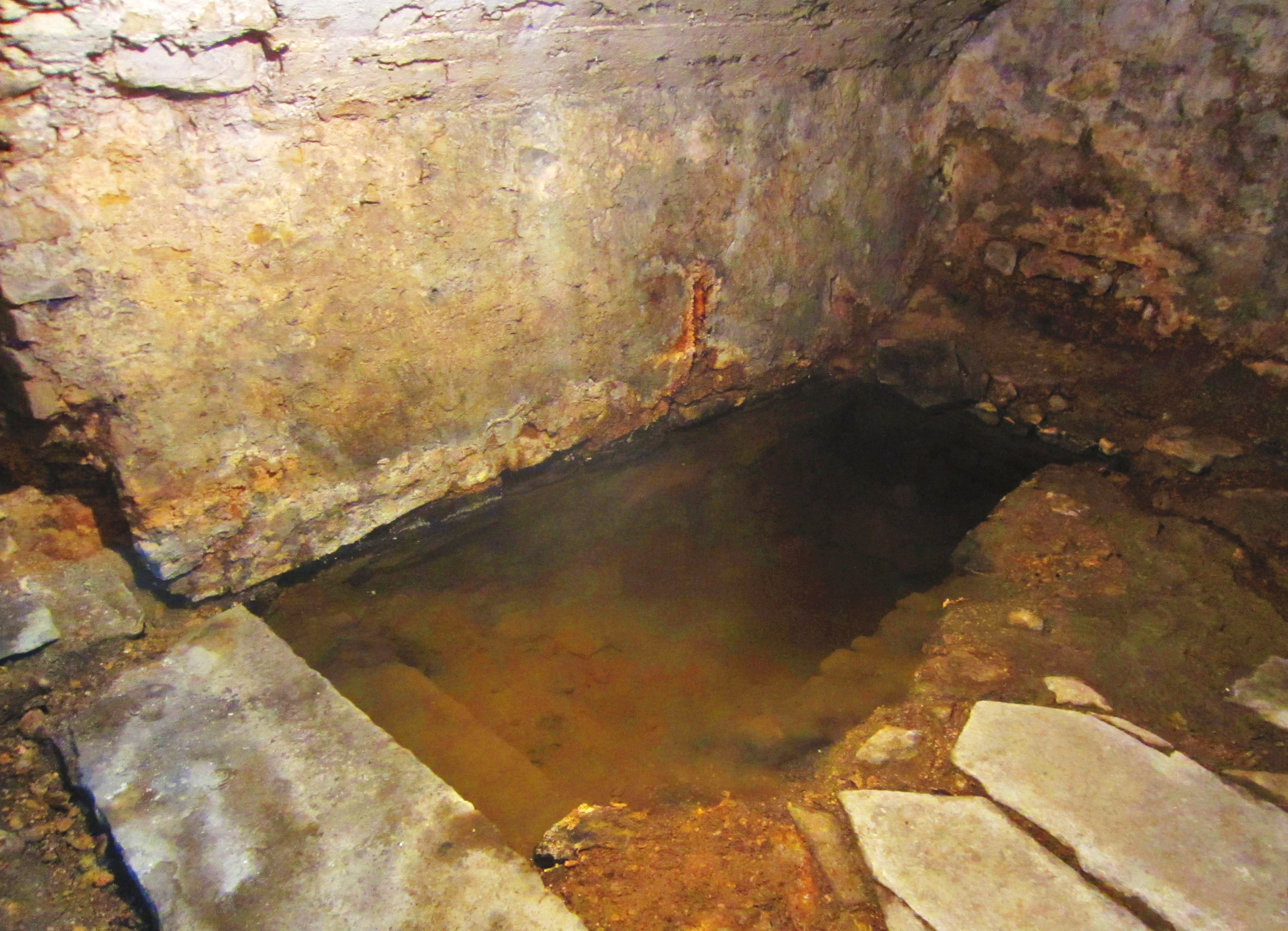 Mikve Metzervisse